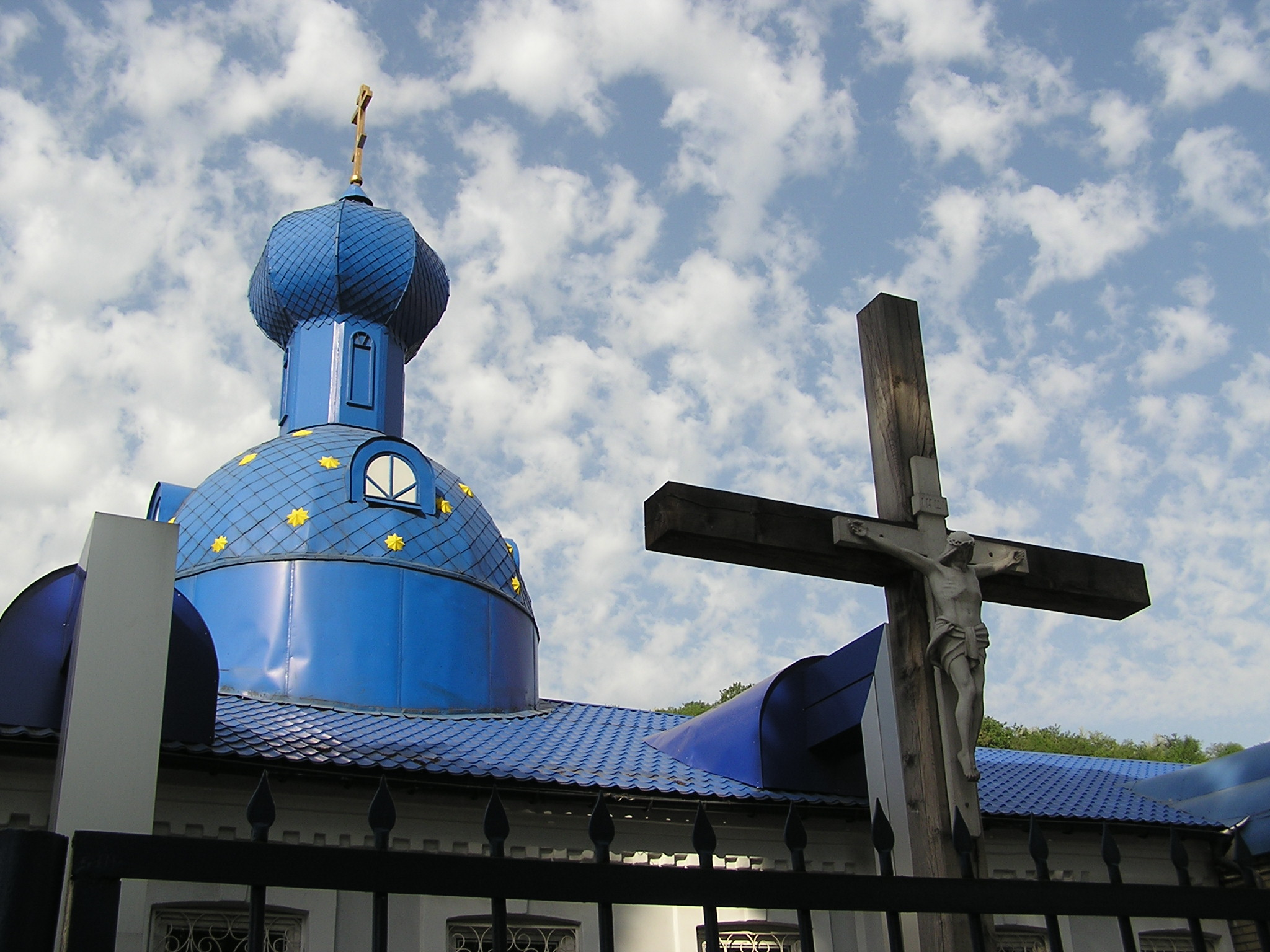 Донецк. Храм по улице Куйбышева